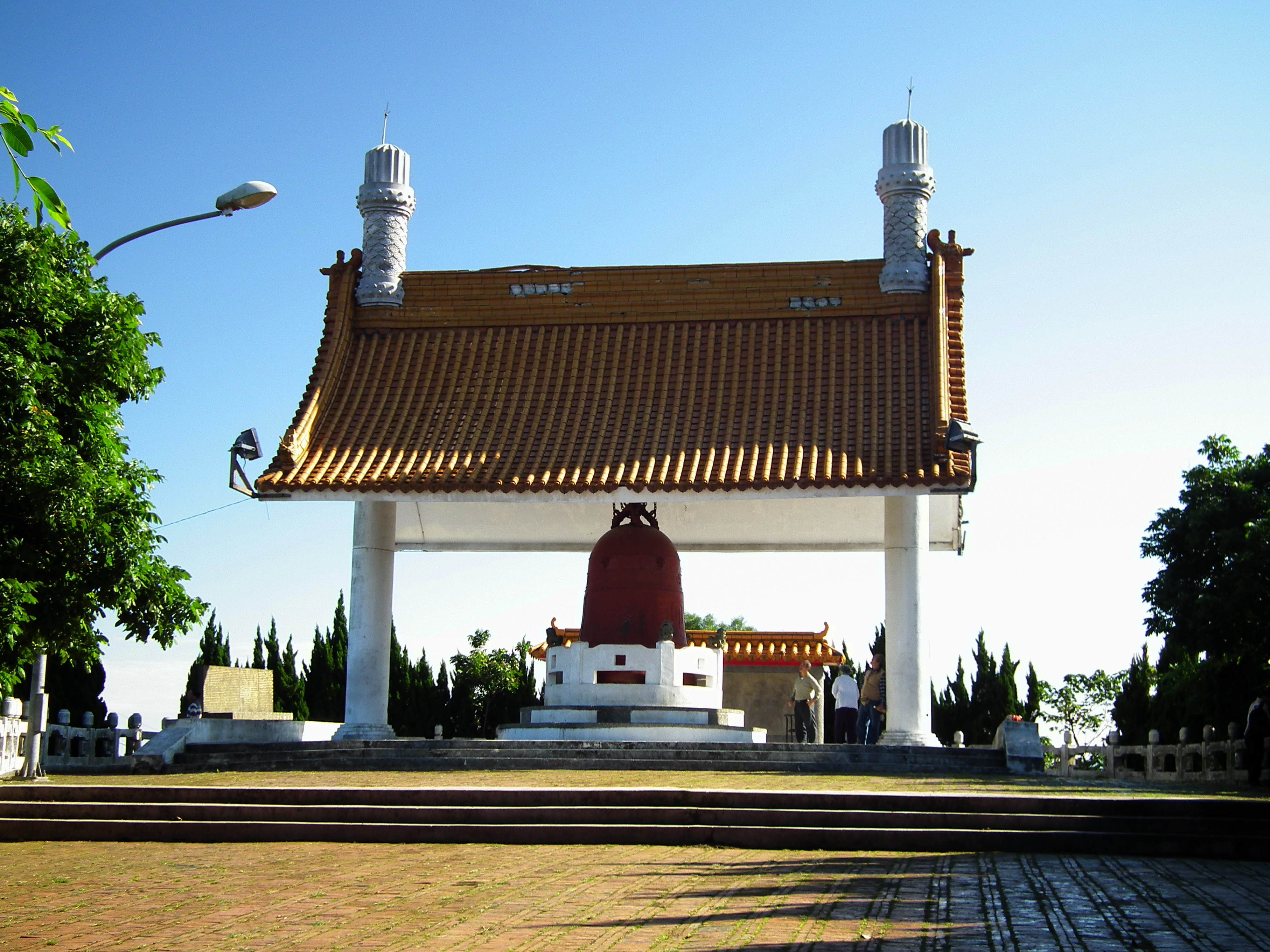 Yuanshan Big Bell 鳶山大鐘